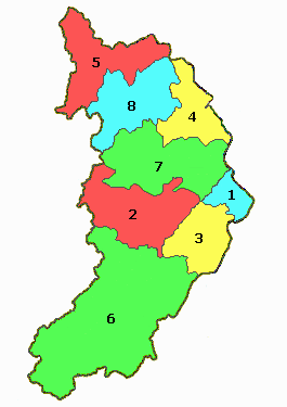 Адм. карта Хакасии